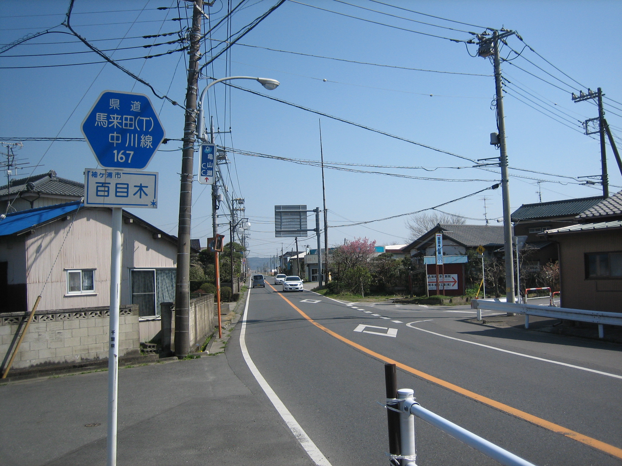 千葉県木更津市と袖ケ浦市を結ぶ県道167号線